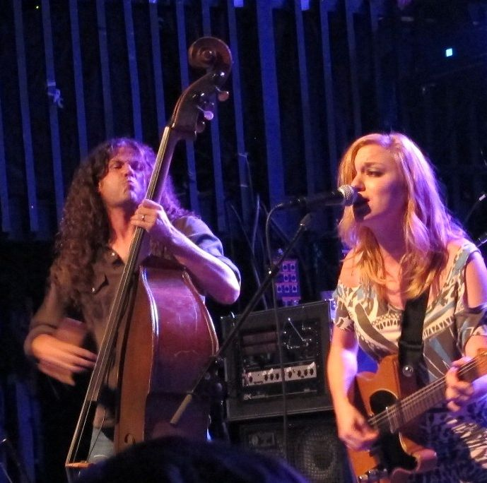 026 Lydia Loveless